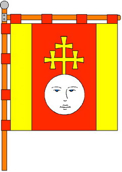 Прапор Іванич